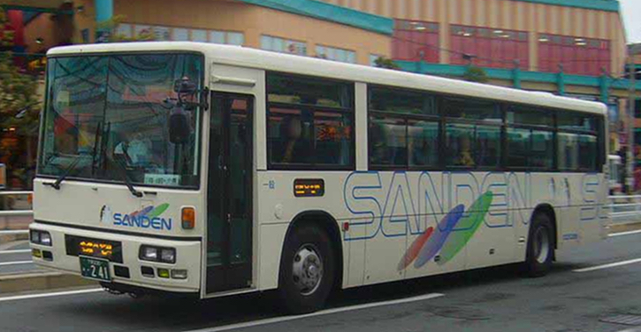 登録番号：下関230あ・241 サンデン交通所属 宇部・小野田 - 小倉線用